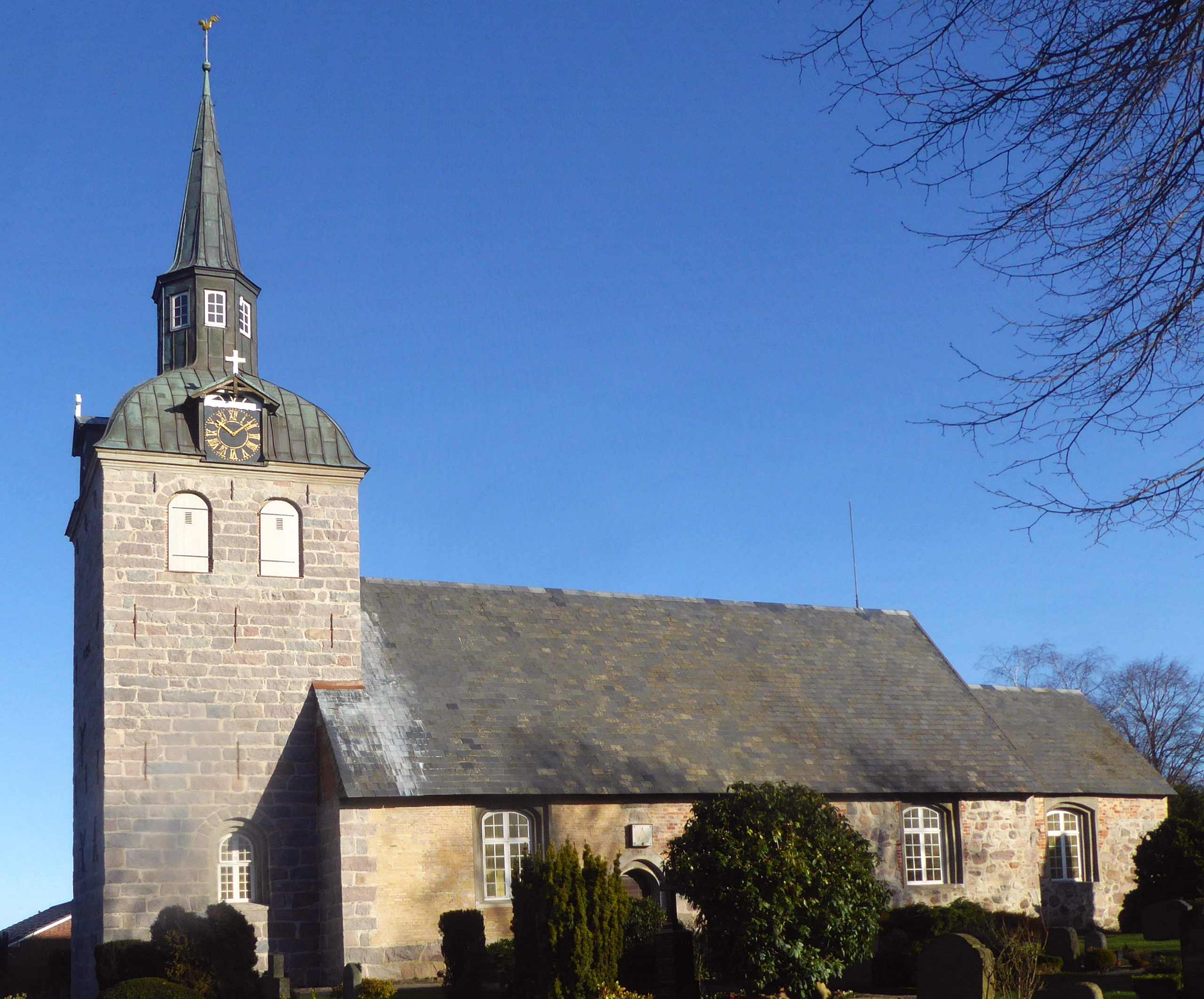 Die evangelisch-luthische Kirche St. Martin aus dem 12. Jahrhundert: Kirche von Steinberg. Feldsteinkirche. Lage im 1963 umbenannten Ort Steinbergkirche (einst Bredegatt an Grenze zu Quern). S. Martin gehört zur Probstei Angeln. Foto Wolfgang PehlemannP1350856